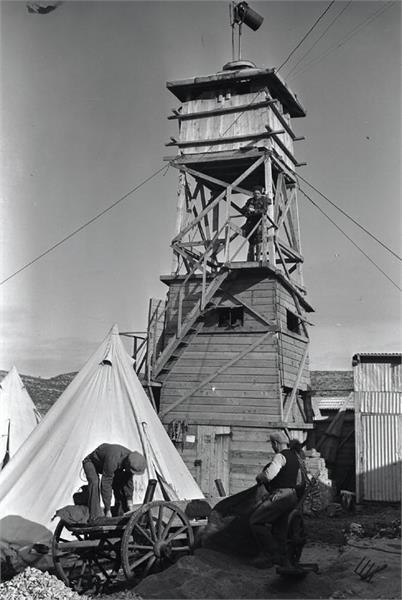 אילון - מגדל הצופים